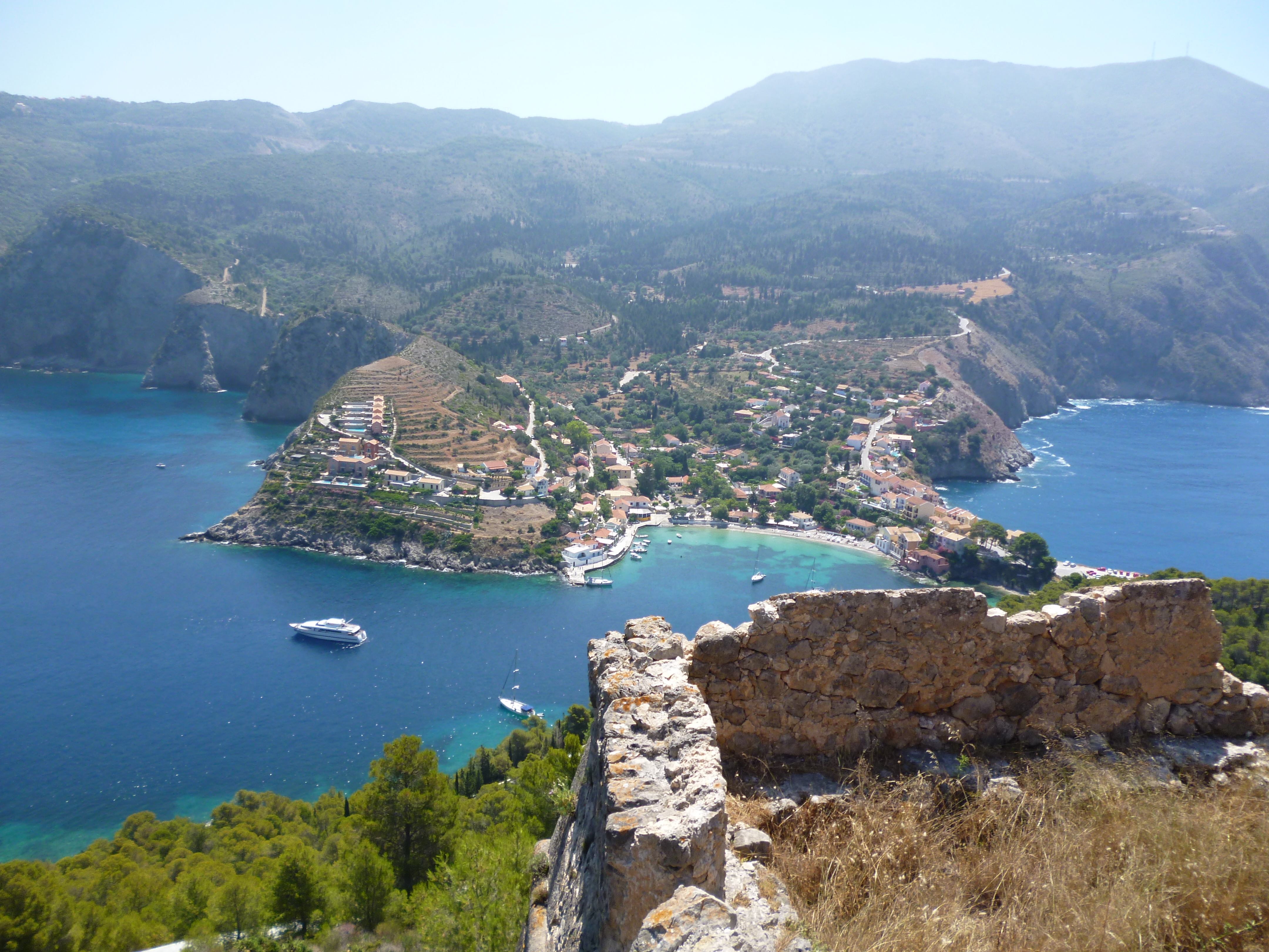 Μια φωτογραφία του χωριού Άσσος, του νησιού Κεφαλονιά, Δυτική Ελλάδα. Τραβηγμένη από την ακρόπολη του Ενετικού κάστρου, τμήμα της οποίας φαίνεται. Στο βάθος διακρίνεται το βουνό Καλό Όρος. Η περιοχή είναι Natura. This is a photography of Natura 2000 protected area with ID GR2220001